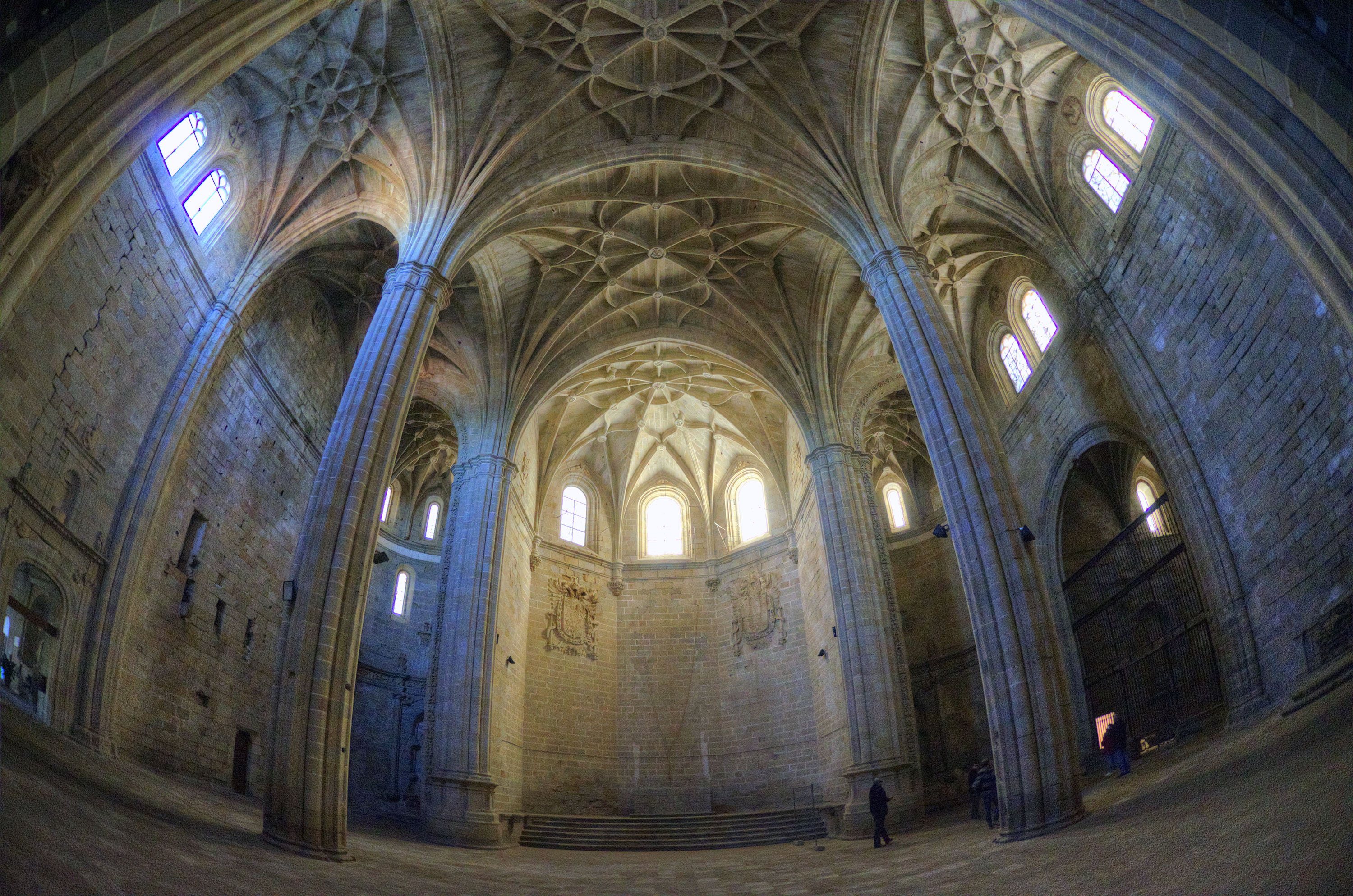 Interior de la iglesia inacabada del convento, actualmente deshabitado y usado para eventos culturales.